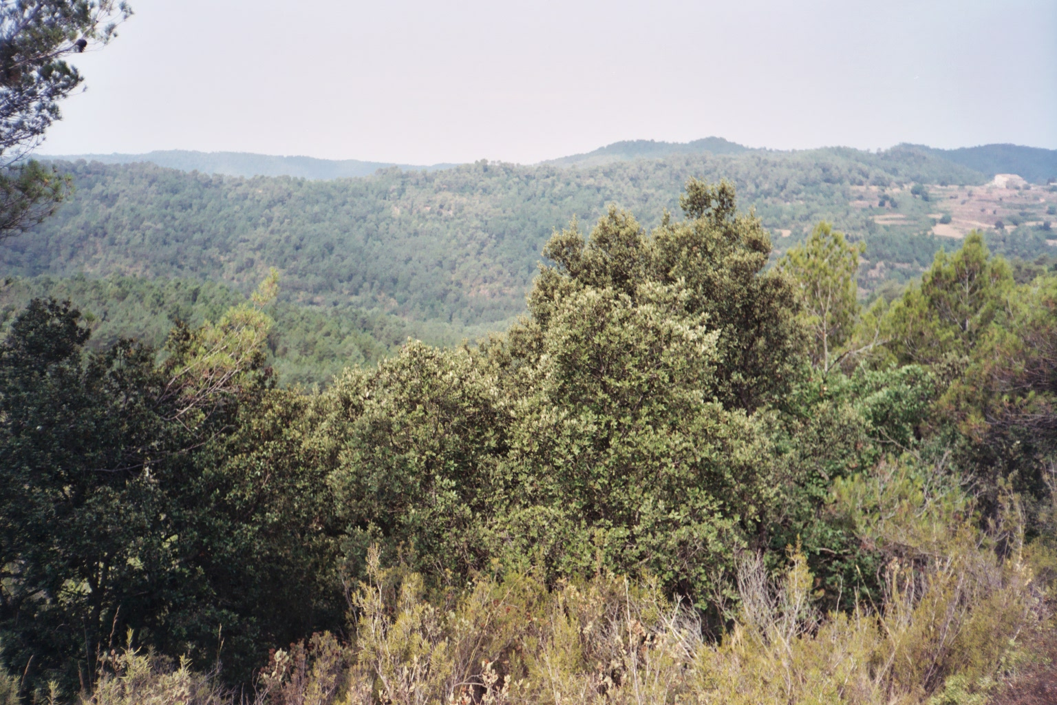 El Serrat del Rossinyol (Monistrol de Calders, Moianès, i Mura, Bages)